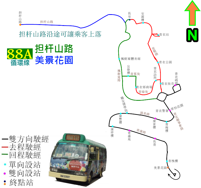 中文（香港）: 新界專線小巴88A路的地圖式路線圖